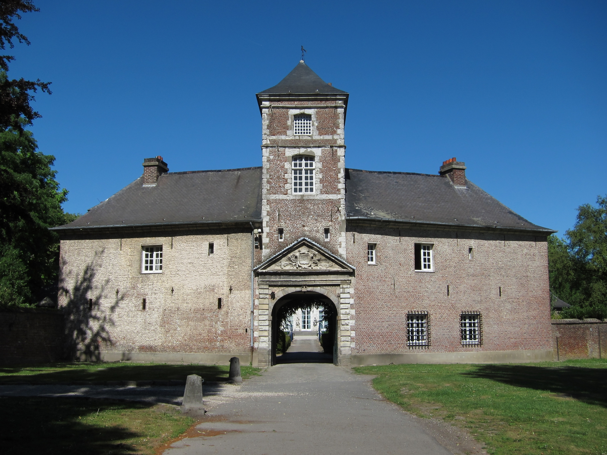 Le porche du château du Vert Bois à Bondues (Nord).